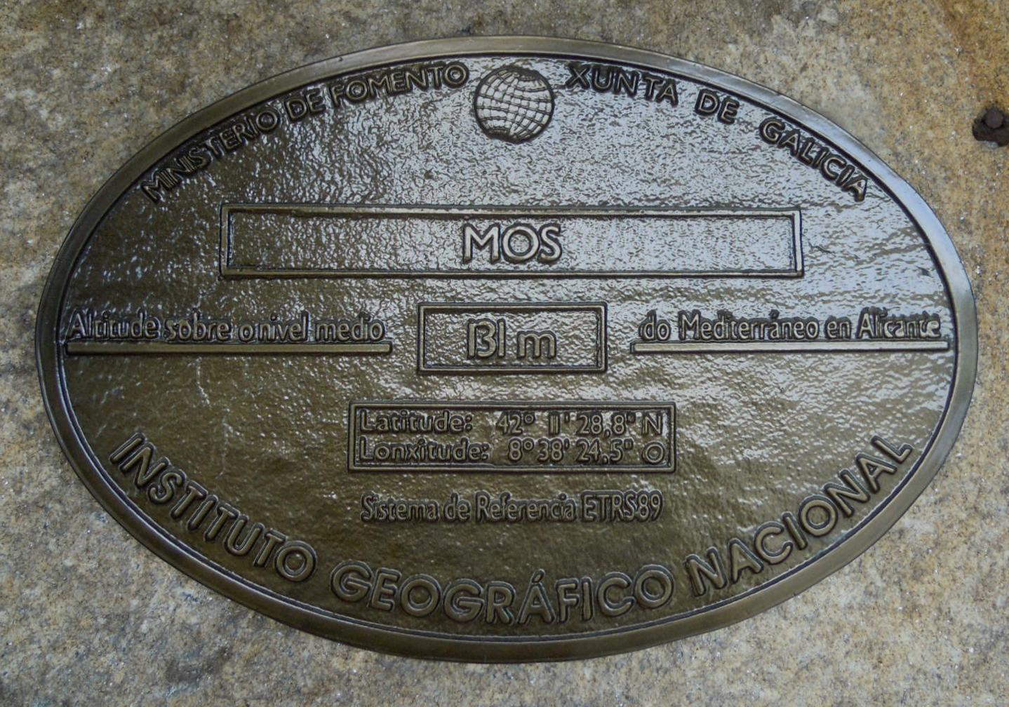 Placa altimétrica na casa consistorial de Mos.